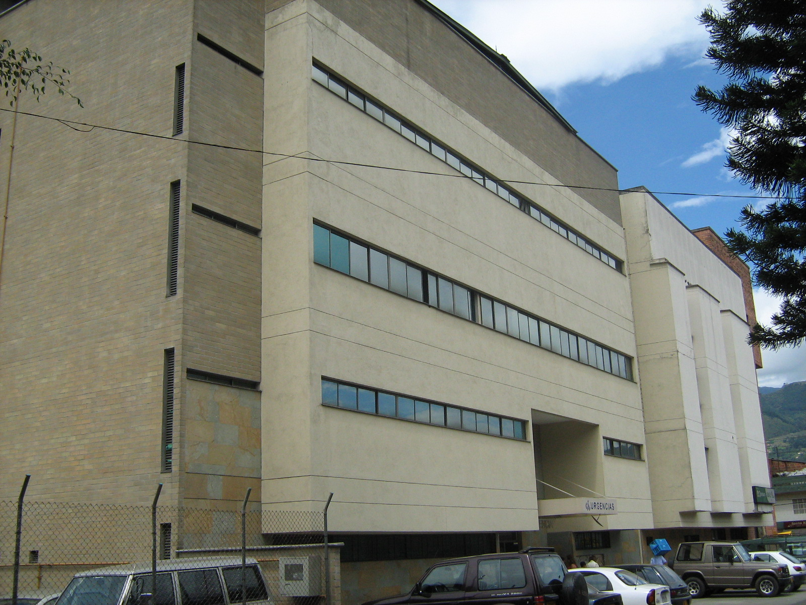 Clínica Antioquia en el municipio de Itagüí, Colombia